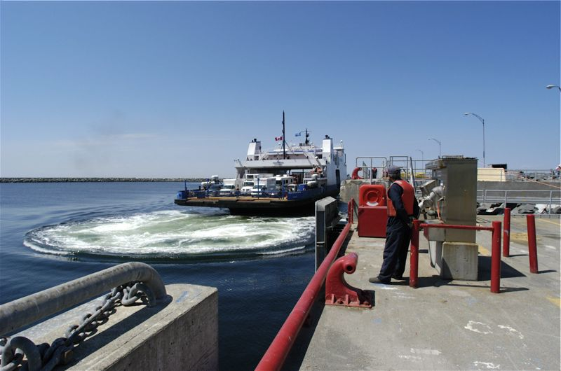 Traversier NM Félix-Antoine-Savard (accostage à Matane)